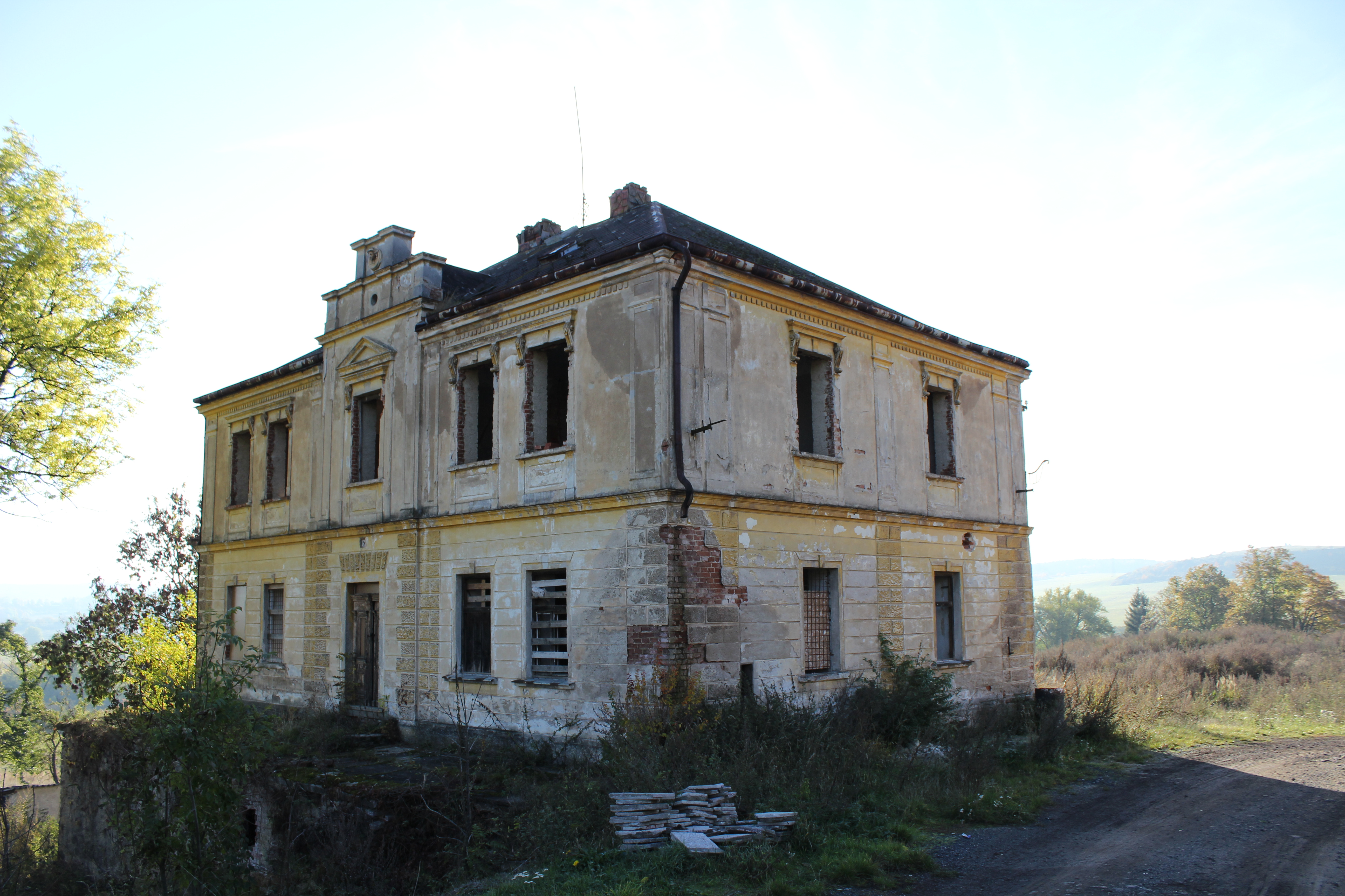 Zámek v budově, části Verušiček.